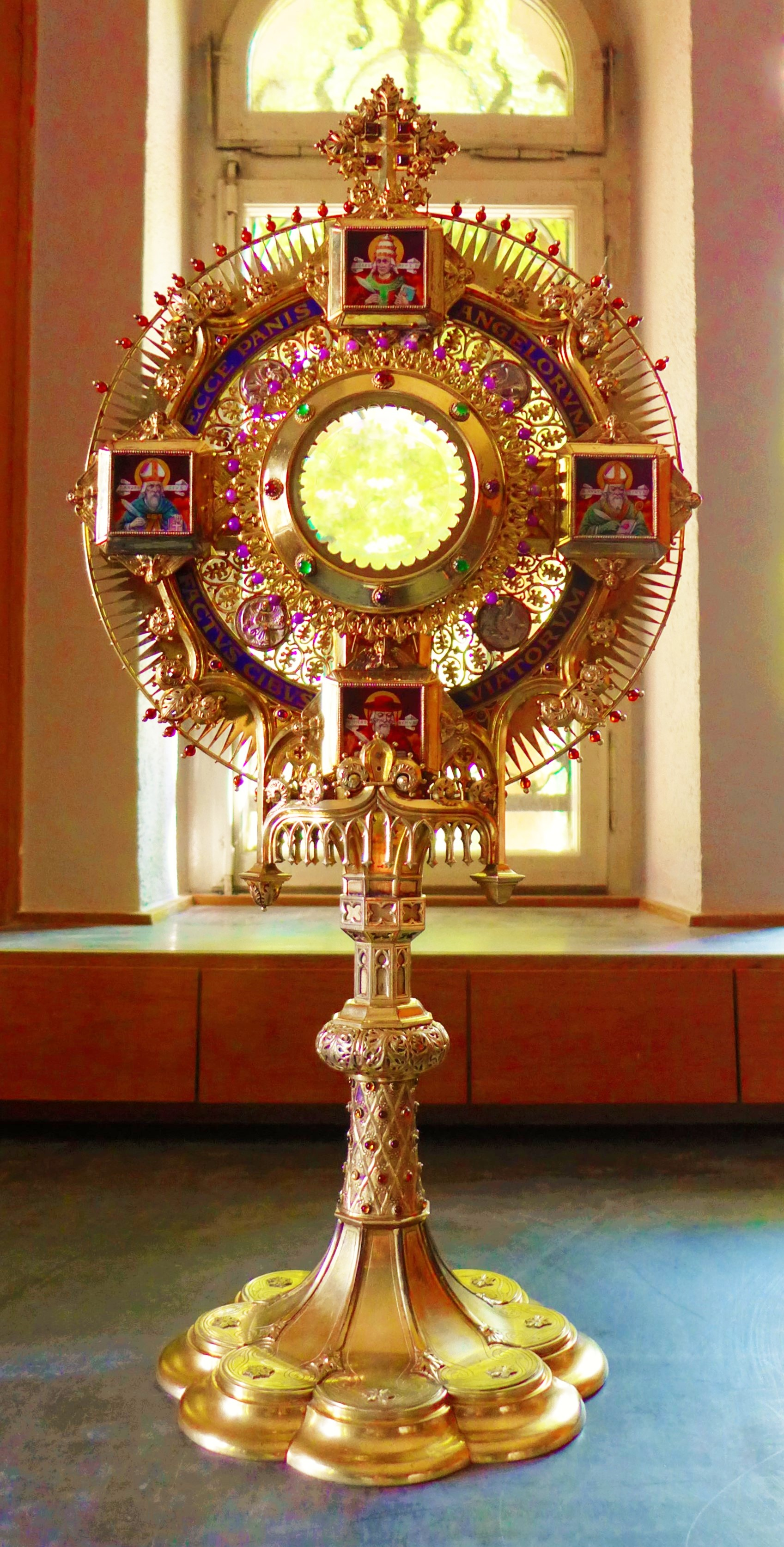 St. Josef (Saarbrücken), Monstranz